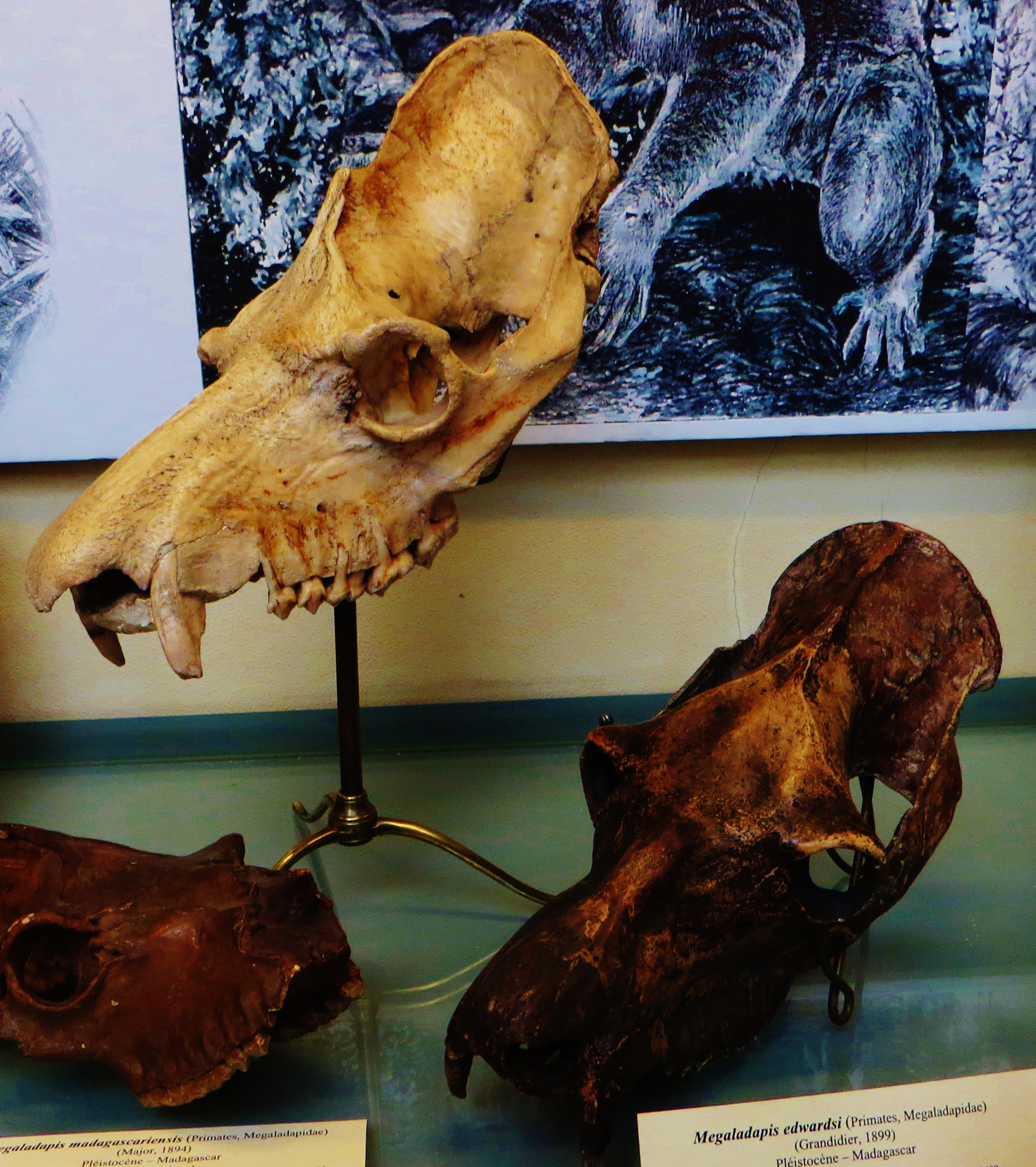 Fossil of Megaladapis, an extinct mammal- Took the photo at Musee d'Histoire Naturelle, Paris